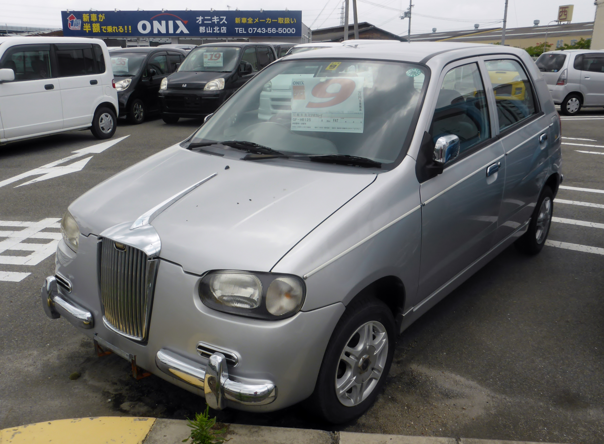 2代目光岡・レイ660ベースグレードをフロントから撮影。